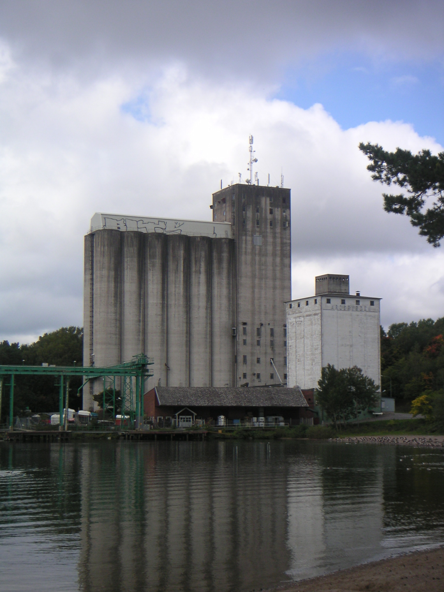 Lantmännens silo i Kalmarsand - ett landmärke i Bålsta (Sweden)